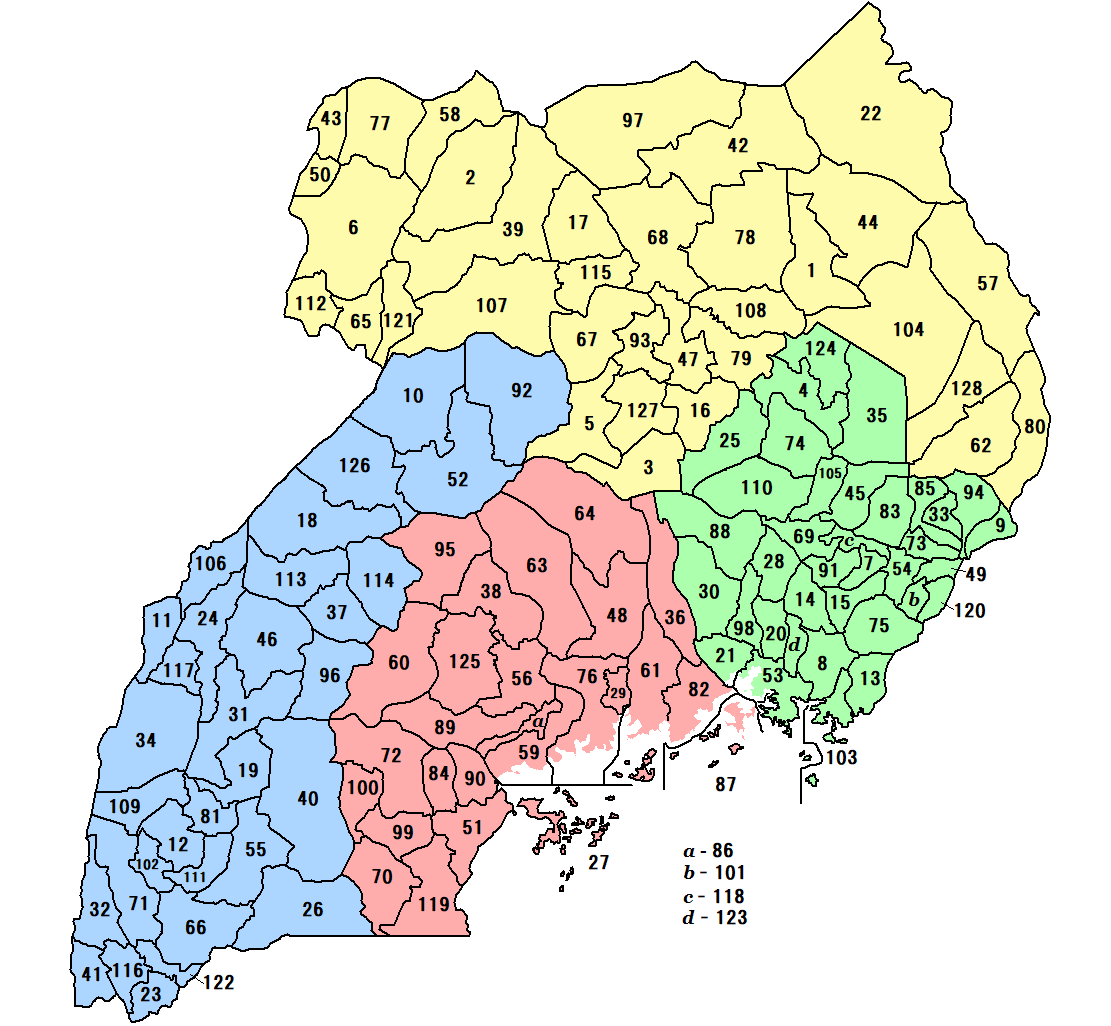 2018年時点のウガンダの県と地域の地図。番号は昨年のFile:Districts of Uganda 2017.pngから続き（123 - 128）になっている。県域はCitypopulation.de/Ugandaを参考とした。